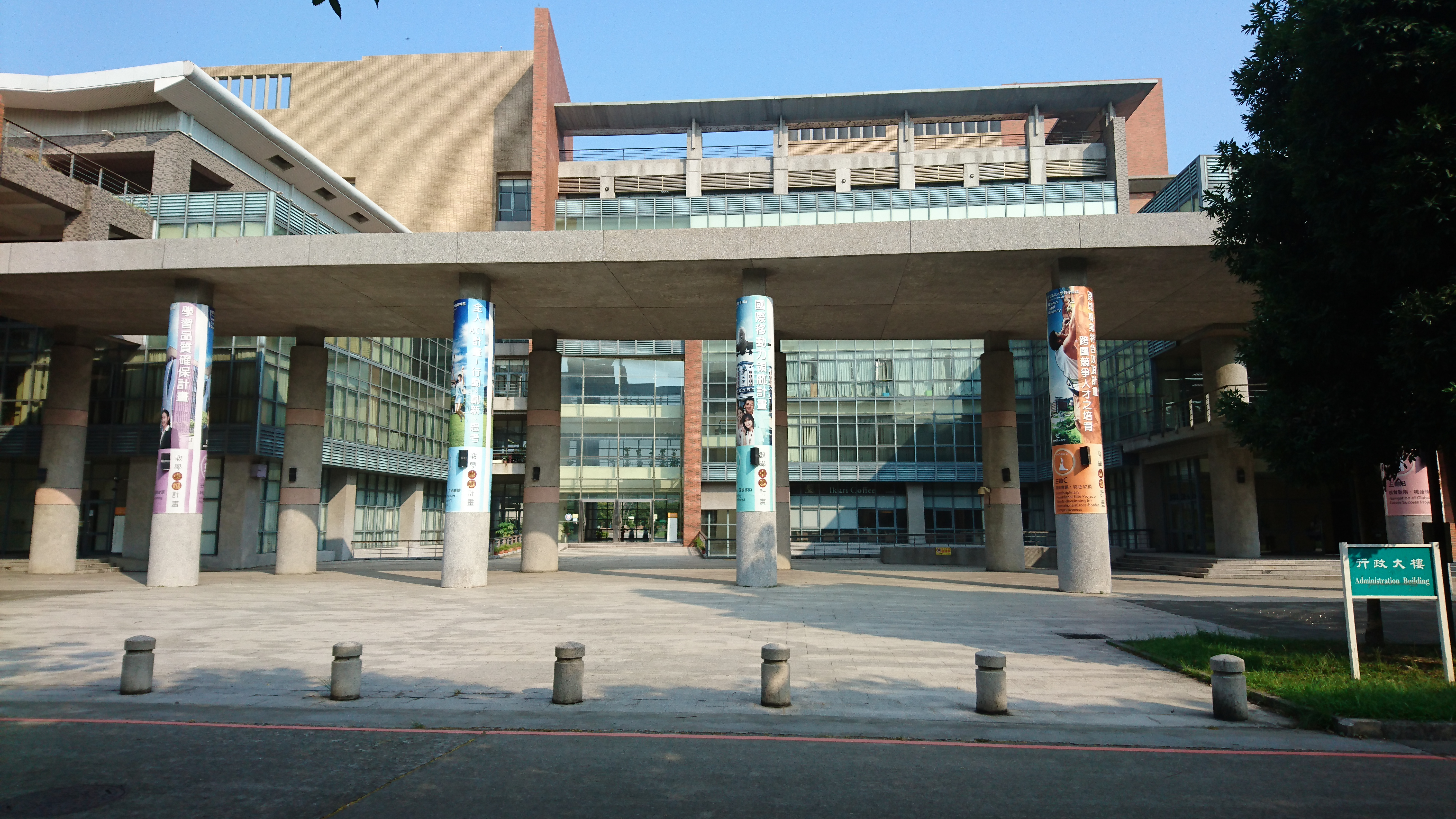 中文（台灣）: 行政大樓近照